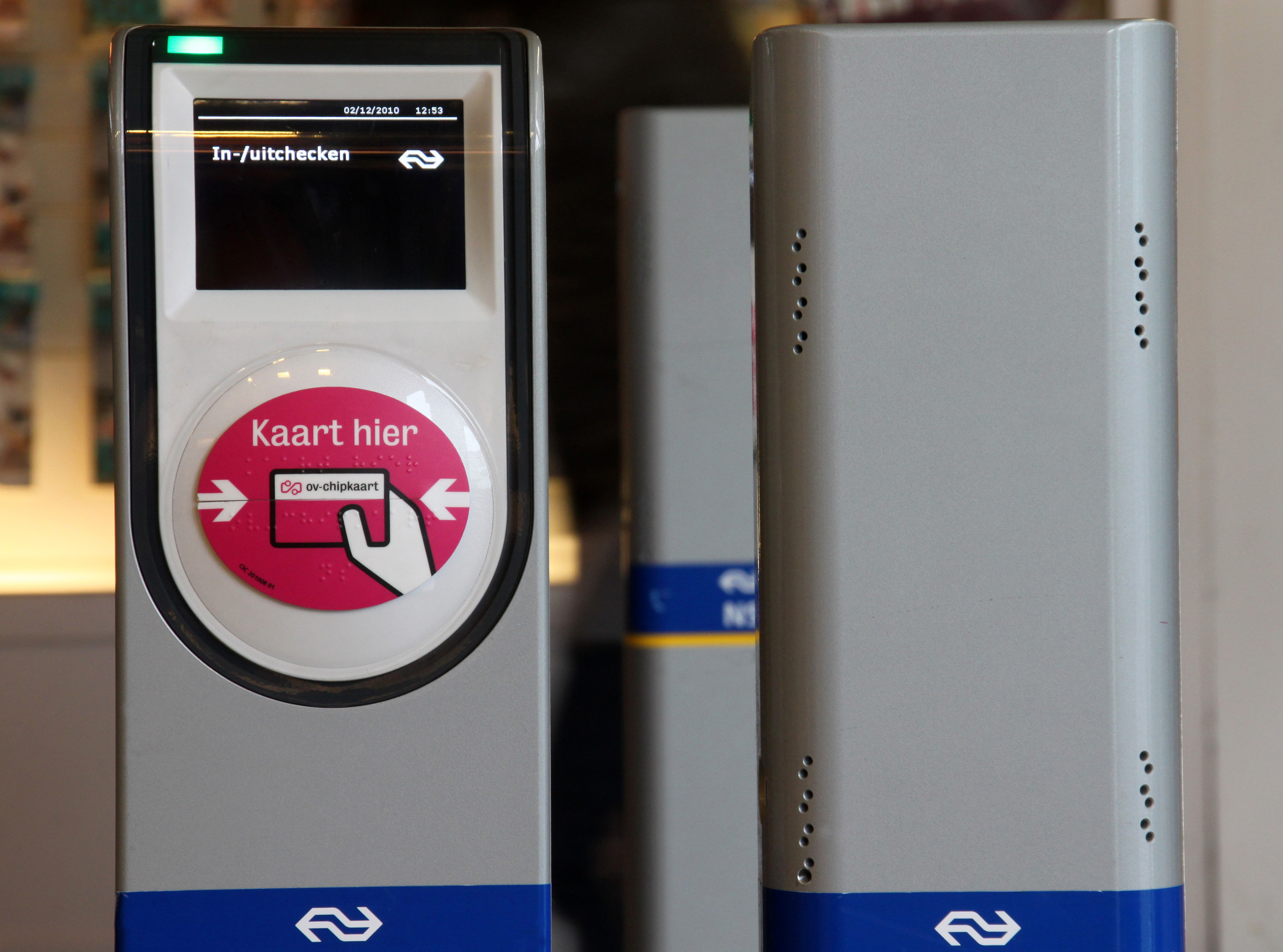 Incheckpaaltjes op station Utrecht Centraal.